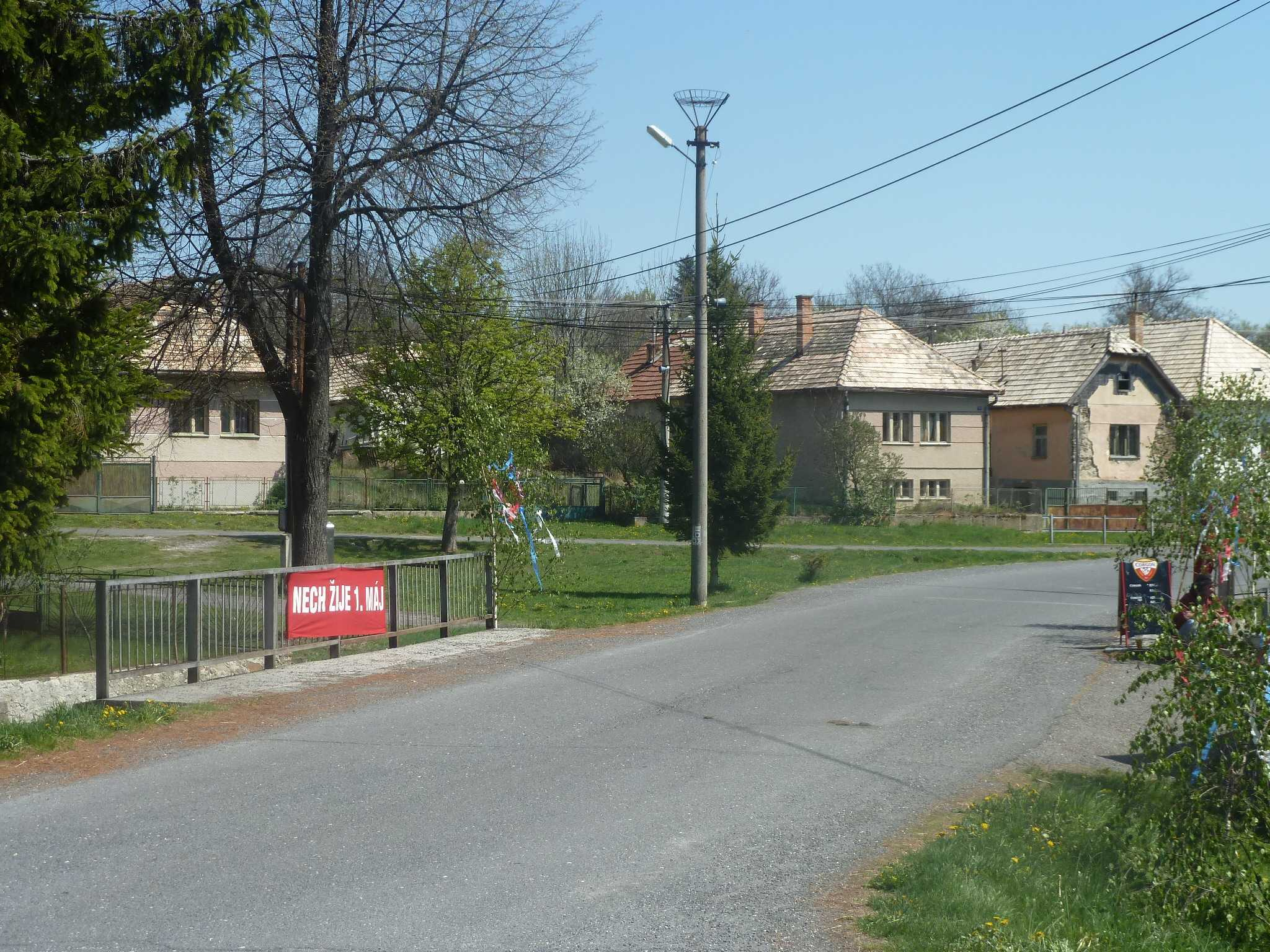 Obec Polichno